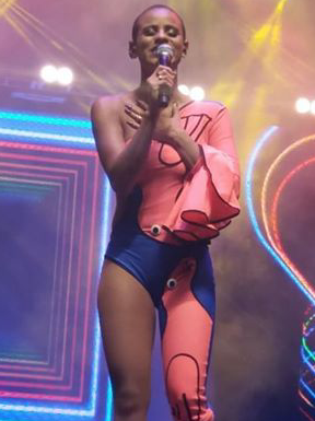 Aline na turnê do Rouge, em 2018.